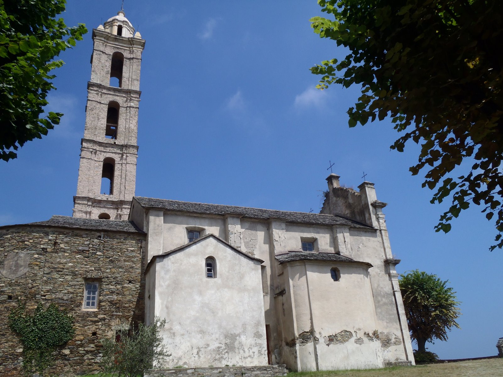 Facade Sud de l'église du XVIIème siècle. .